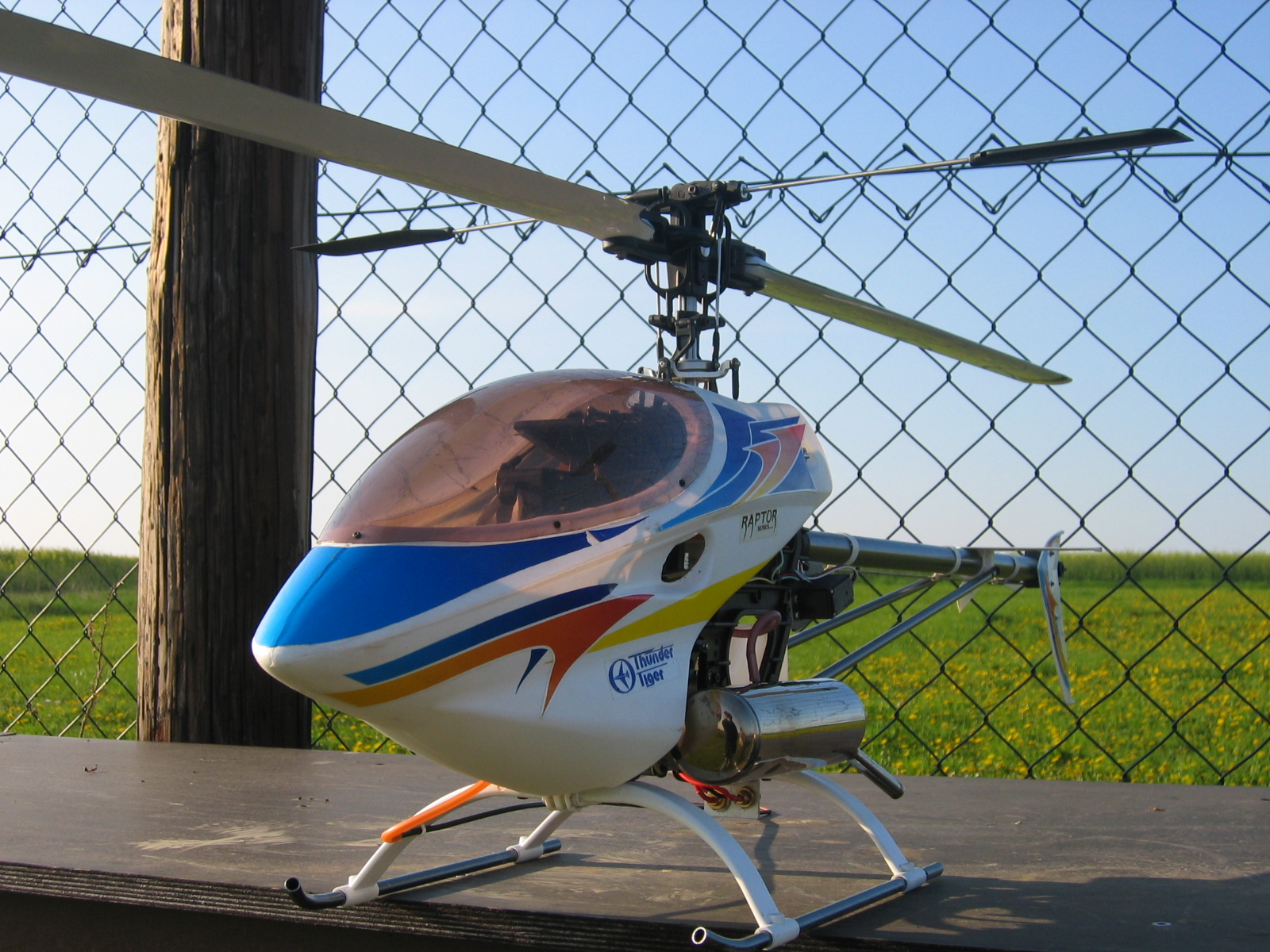 Modellhubschrauber Raptor Titan (8,5ccm Verbrenner) von Thunder Tiger